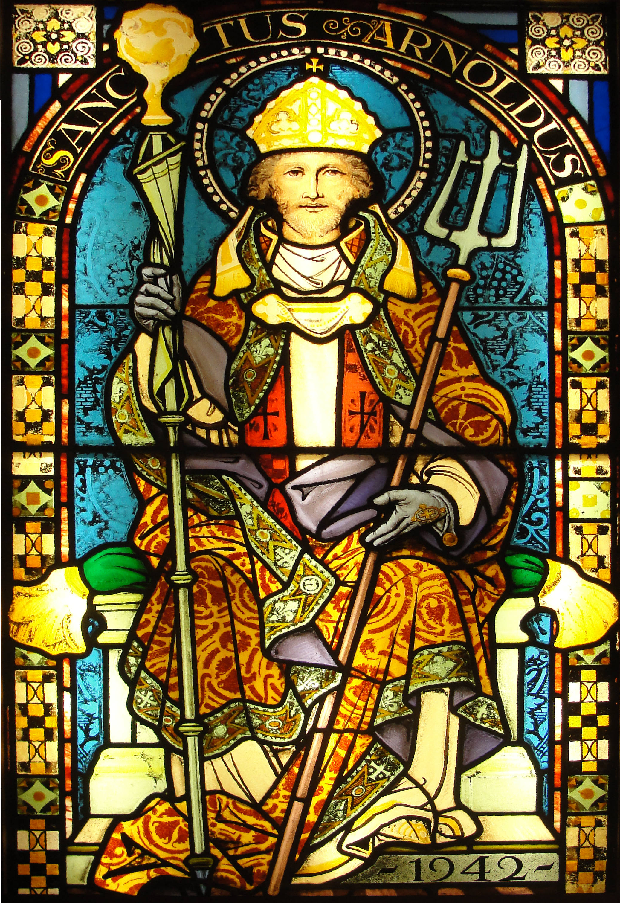 Glasraam van Sint-Arnoldus van Soissons, onbekende kunstenaar, gedateerd 1942, in de brouwerij Huyghe, Melle, België